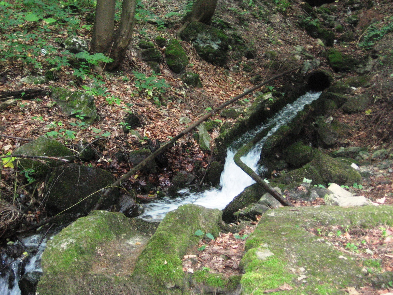 Garadna-patak forrása (Ómassa, Miskolc)